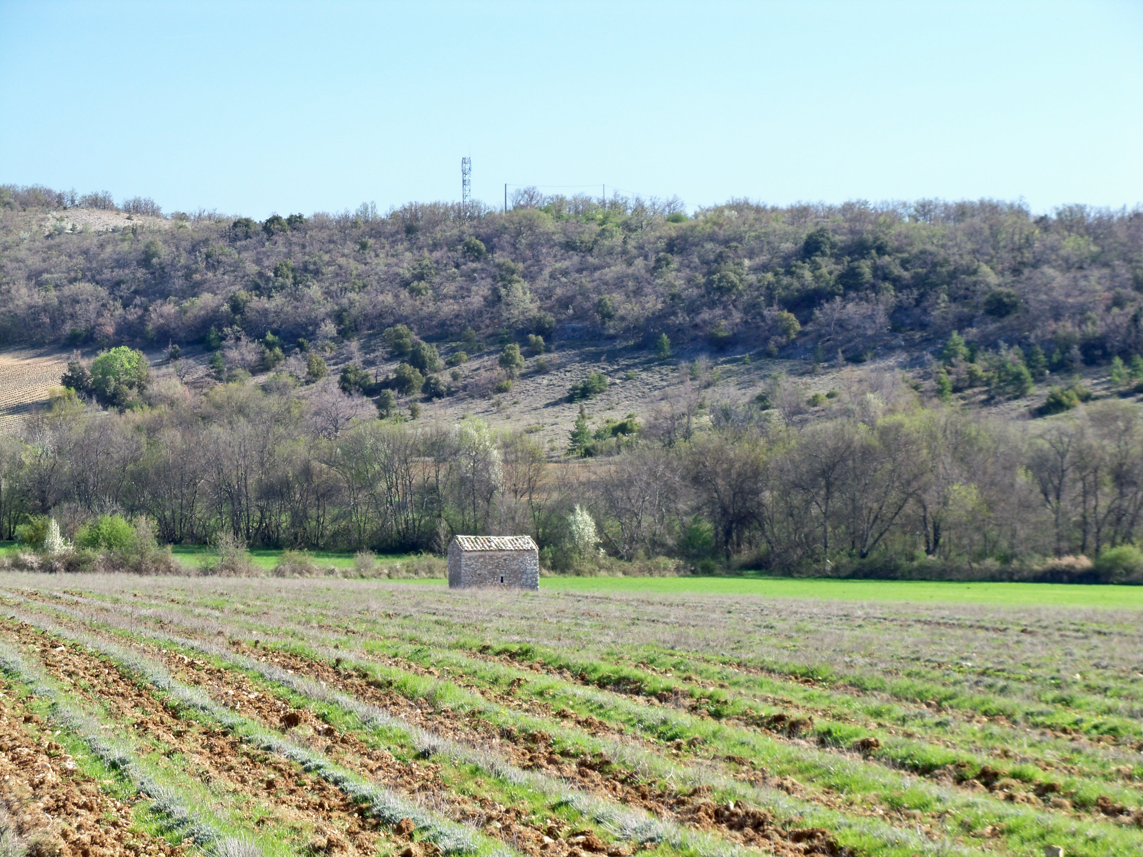 Cabanon et champs de lavande (au printemps) à Montsalier (04)